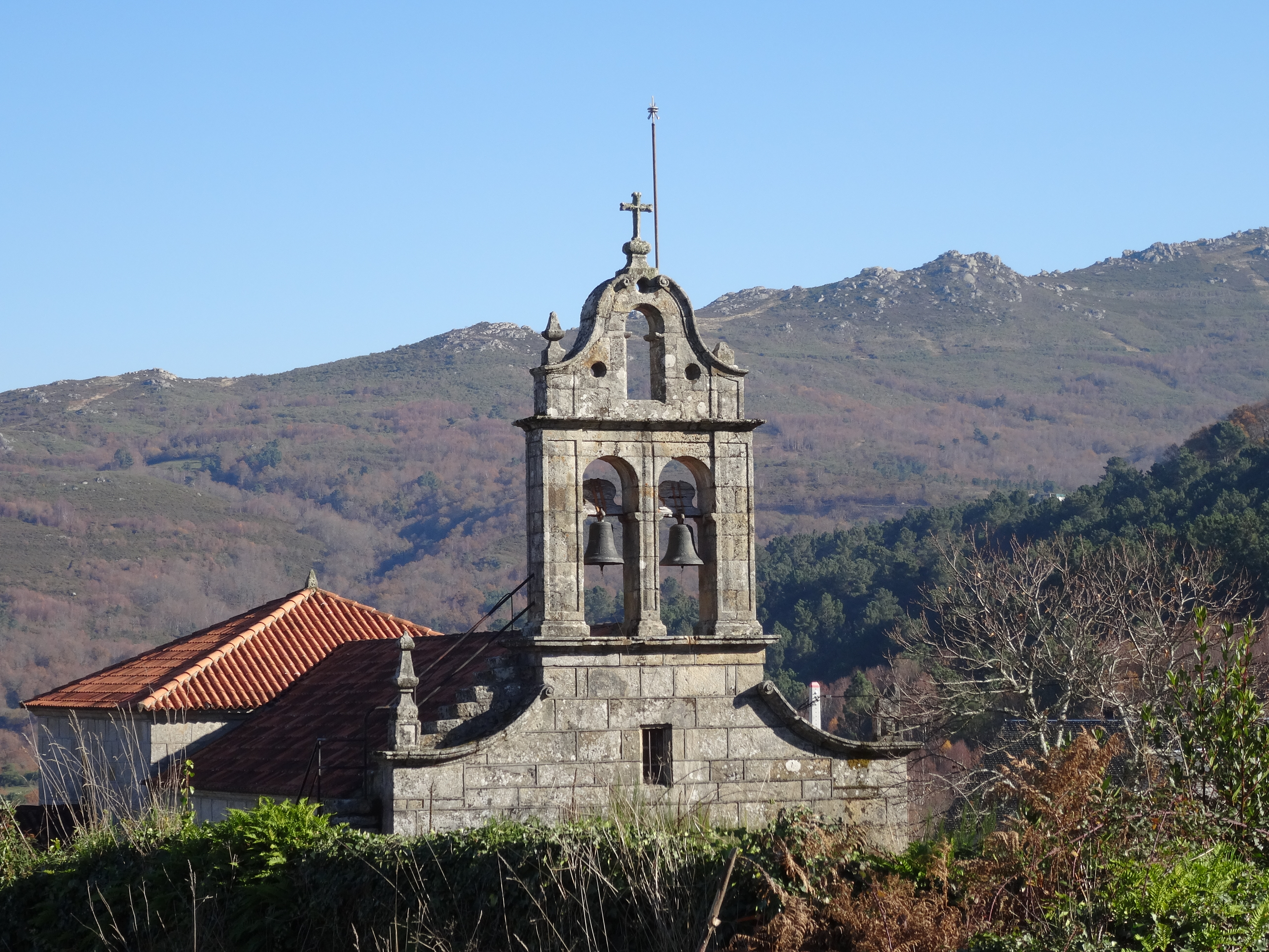 Ver título.